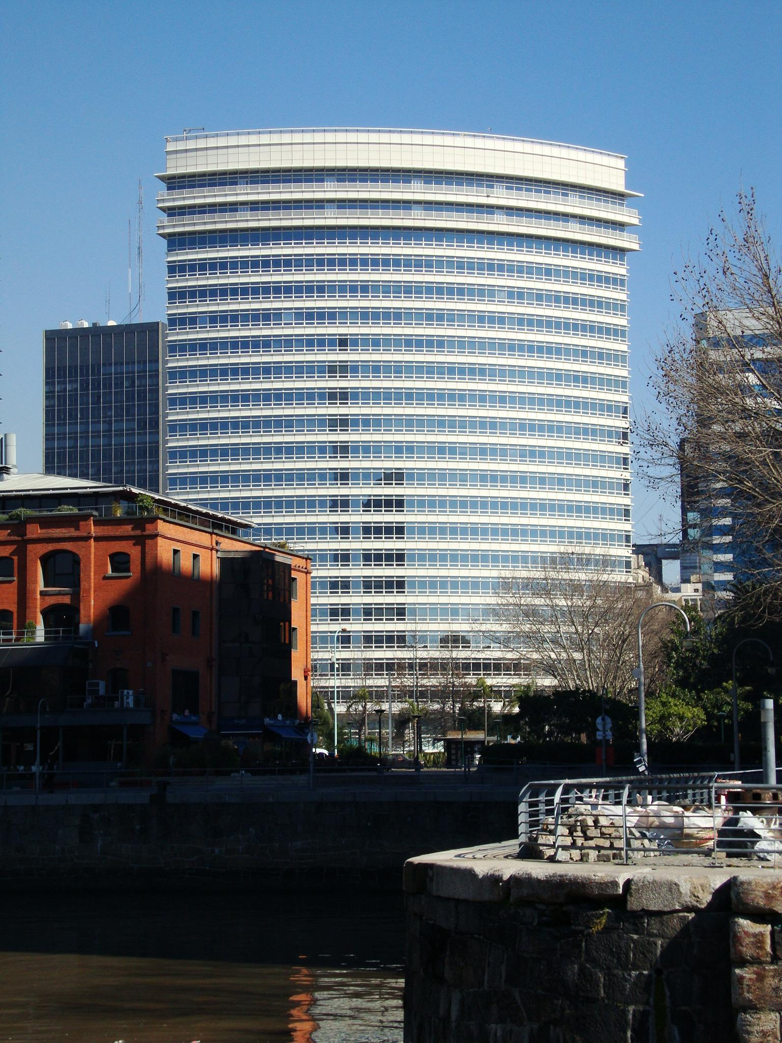 Edificio República, del arquitecto César Pelli, visto desde el malecón este del Dique 4 de Puerto Madero. Buenos Aires, Argentina.